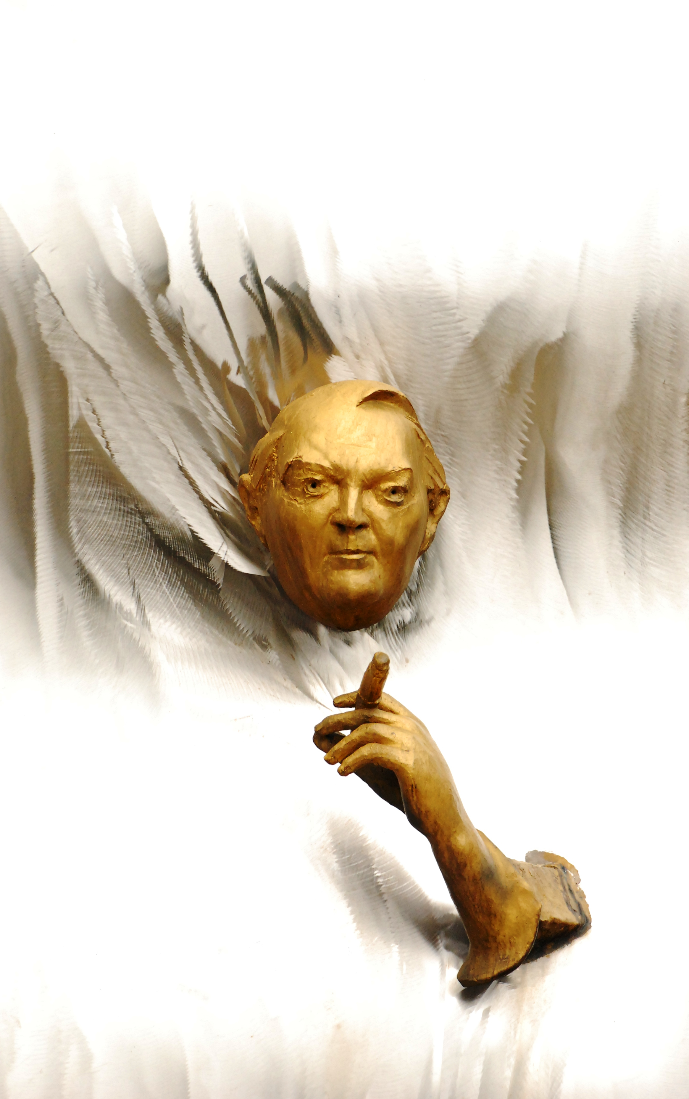 Gedenkbüste für den deutschen Bundeskanzler Ludwig Erhard am Ludwig-Erhard-Platz in Gmund am Tegernsee, Landkreis Miesbach, Regierungsbezirk Oberbayern, Bayern. Geschaffen vom Bildhauer Otto Wesendock (Waakirchen), errichtet im Mai 2003 durch die Gemeinde Gmund (Erhards Grabstätte befindet sich im Bergfriedhof von Gmund.) Foto gemäß den Voraussetzungen zur Panoramafreiheit von öffentlicher Verkehrsfläche aus aufgenommen.